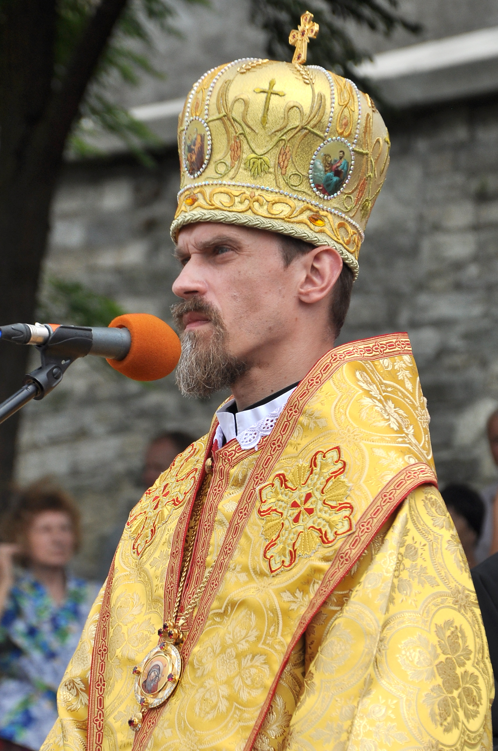 Молитовна хода «Стації митрополита Андрея», яка пройшла вулицями м. Тернополя 26 липня 2015 року на вшанування митрополита УГКЦ Андрея Шептицького. Проповідь єпископа-помічника Тернопільсько-Зборівського УГКЦ Теодора (Мартинюка).